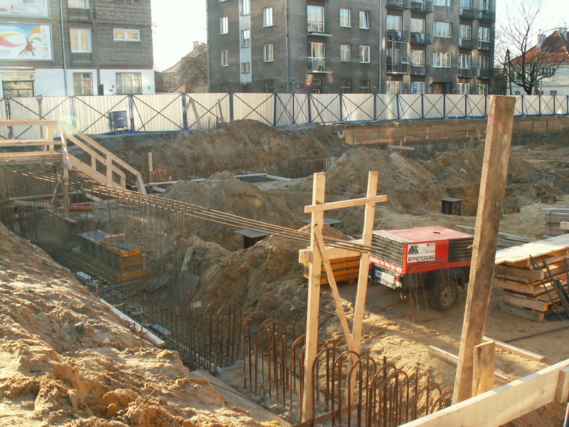 Budowana stacja A-21 Stare Bielany/Building Stare Bielany station